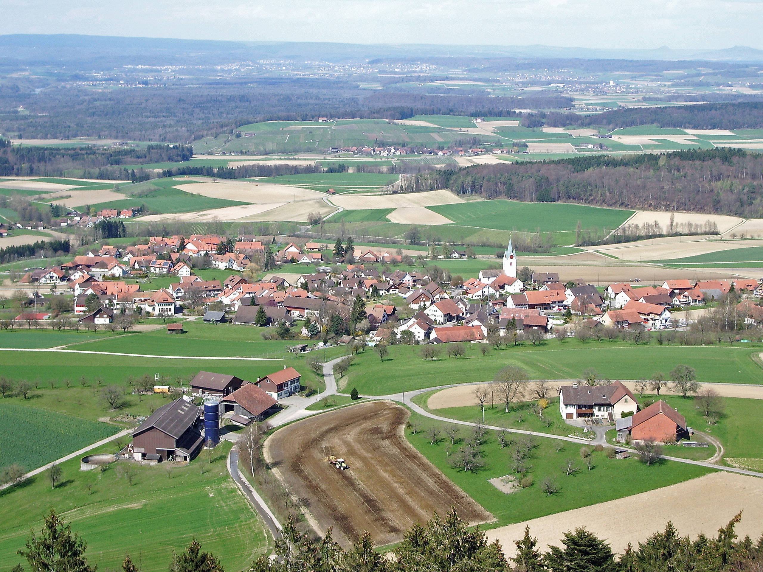 Buch am Irchel vom Irchelturm aus gesehen. Foto selbst erstellt am 7.4.2007 H. Müller